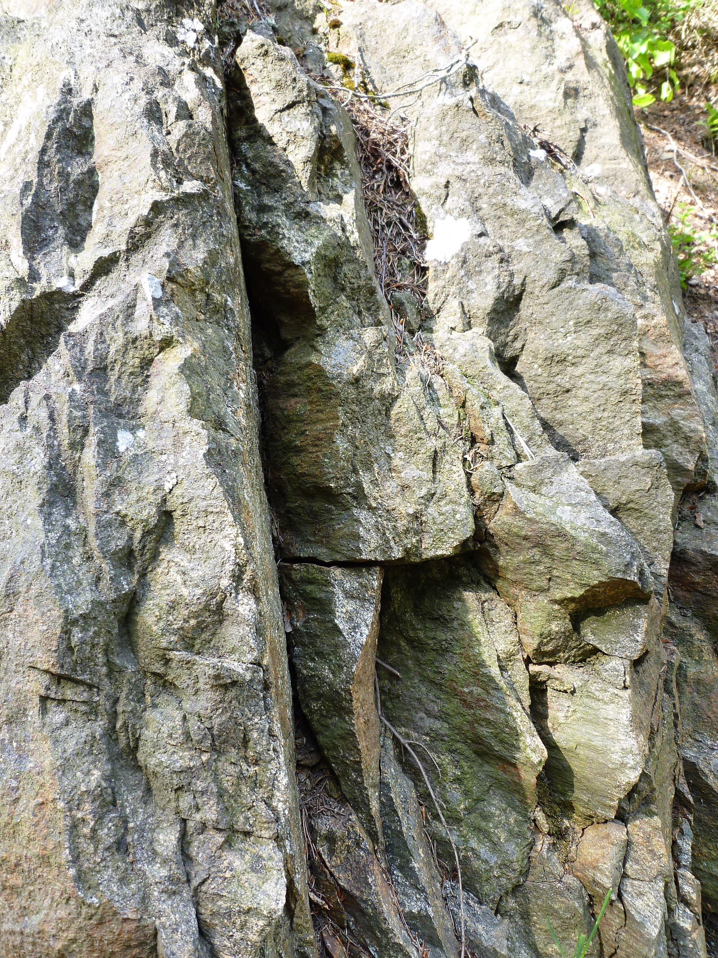 Straßenaufschluss am Aignberg, nordöstlich von Gneißen, Gemeinde Rattenberg. Geotop im Landkreis Straubing-Bogen; Nr. 278A002.